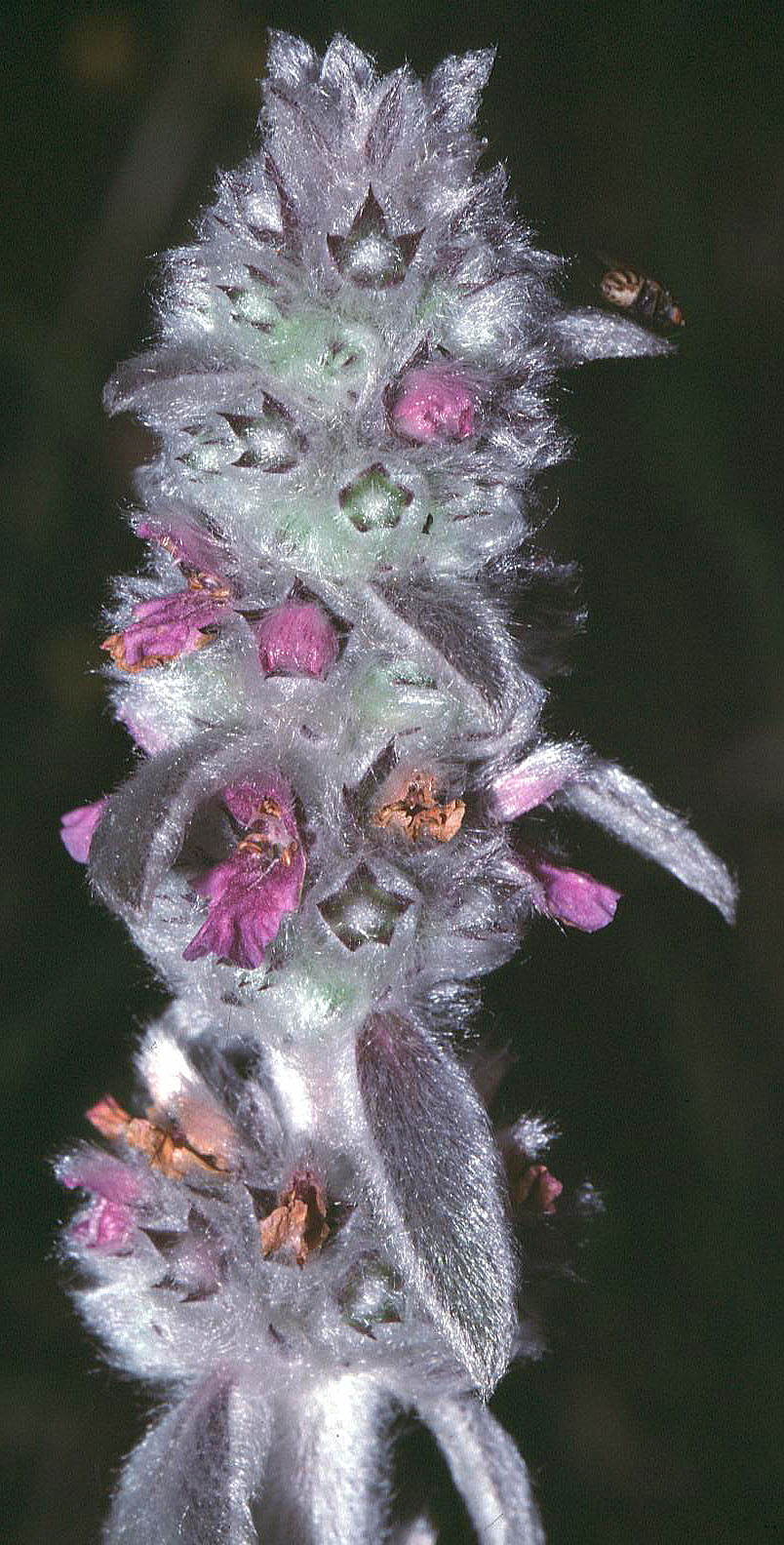 eigenes Foto von 1991, Oberfranken